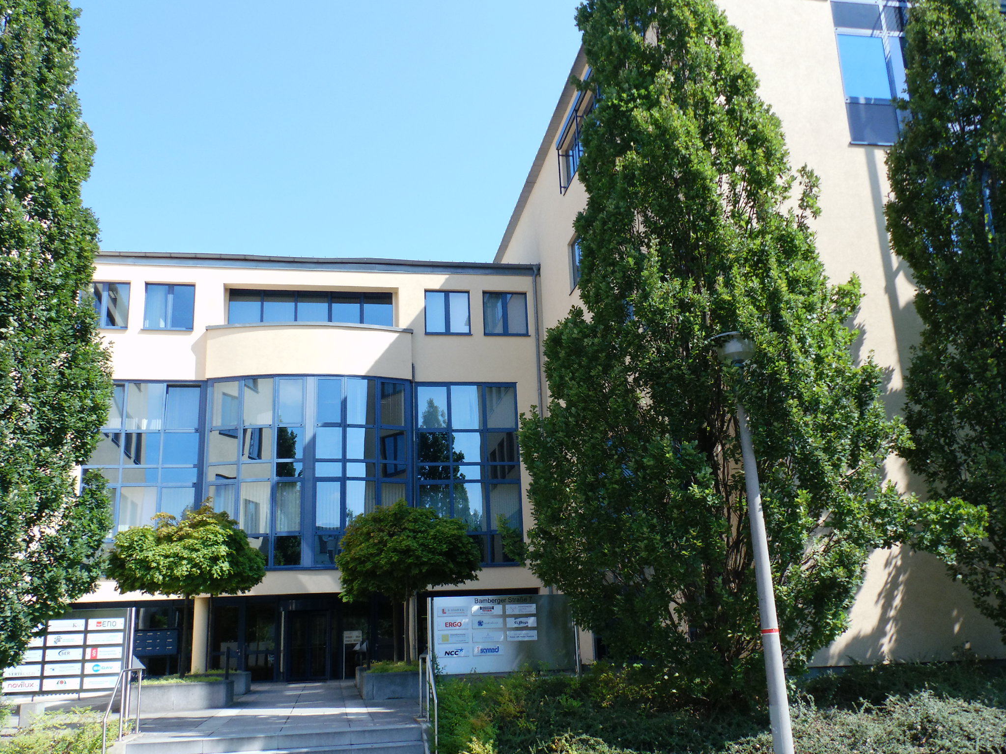 Bildungsstätte der Kulturakademie, Bamberger Straße, Dresden (2015)